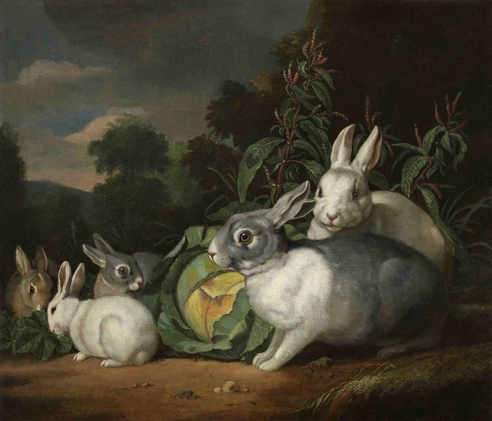 Gemälde von Jakob Samuel Beck